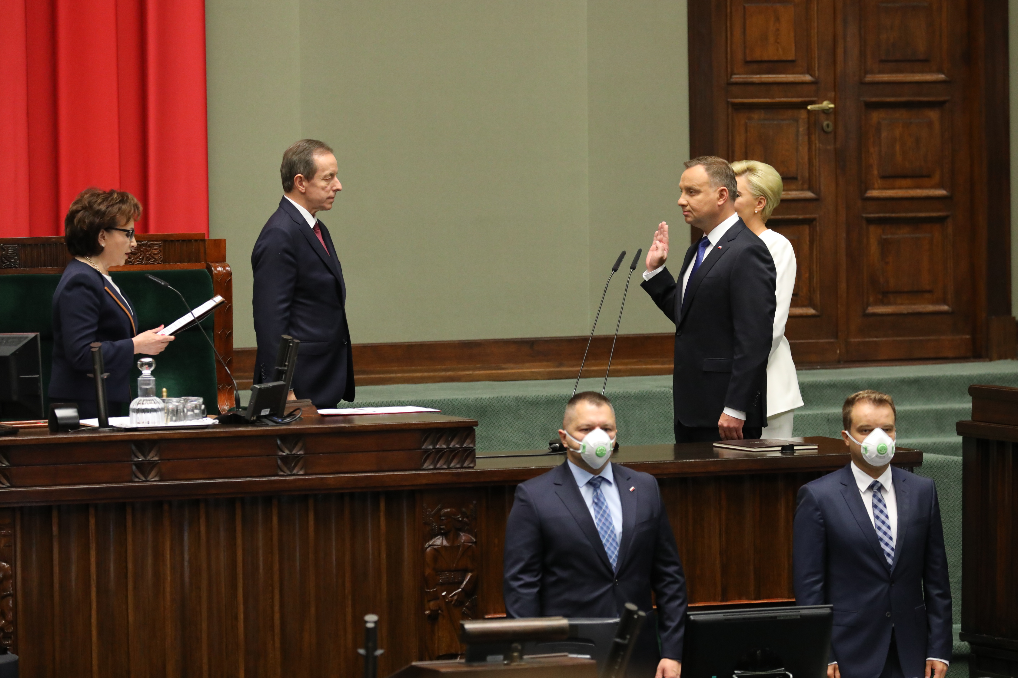 Fot. Kancelaria Sejmu/Rafał Zambrzycki podczas uroczystość zaprzysiężenia Prezydenta RP Andrzeja Dudy przed Zgromadzeniem Narodowym